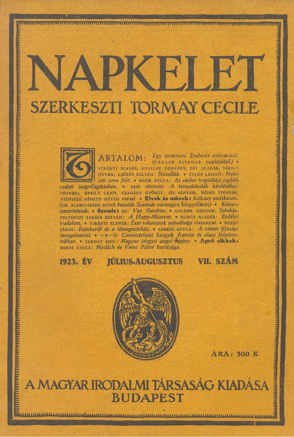 Napkelet címlap/borító 1923/júl.-aug. Az engedélynél és a licenc megadásánál különösen a fenti licenc (3) sz. pontjára hivatkozom. ♥♥♥ Kerge Kísértet ✍ 2011. december 18., 12:42 (CET) (feltöltő).